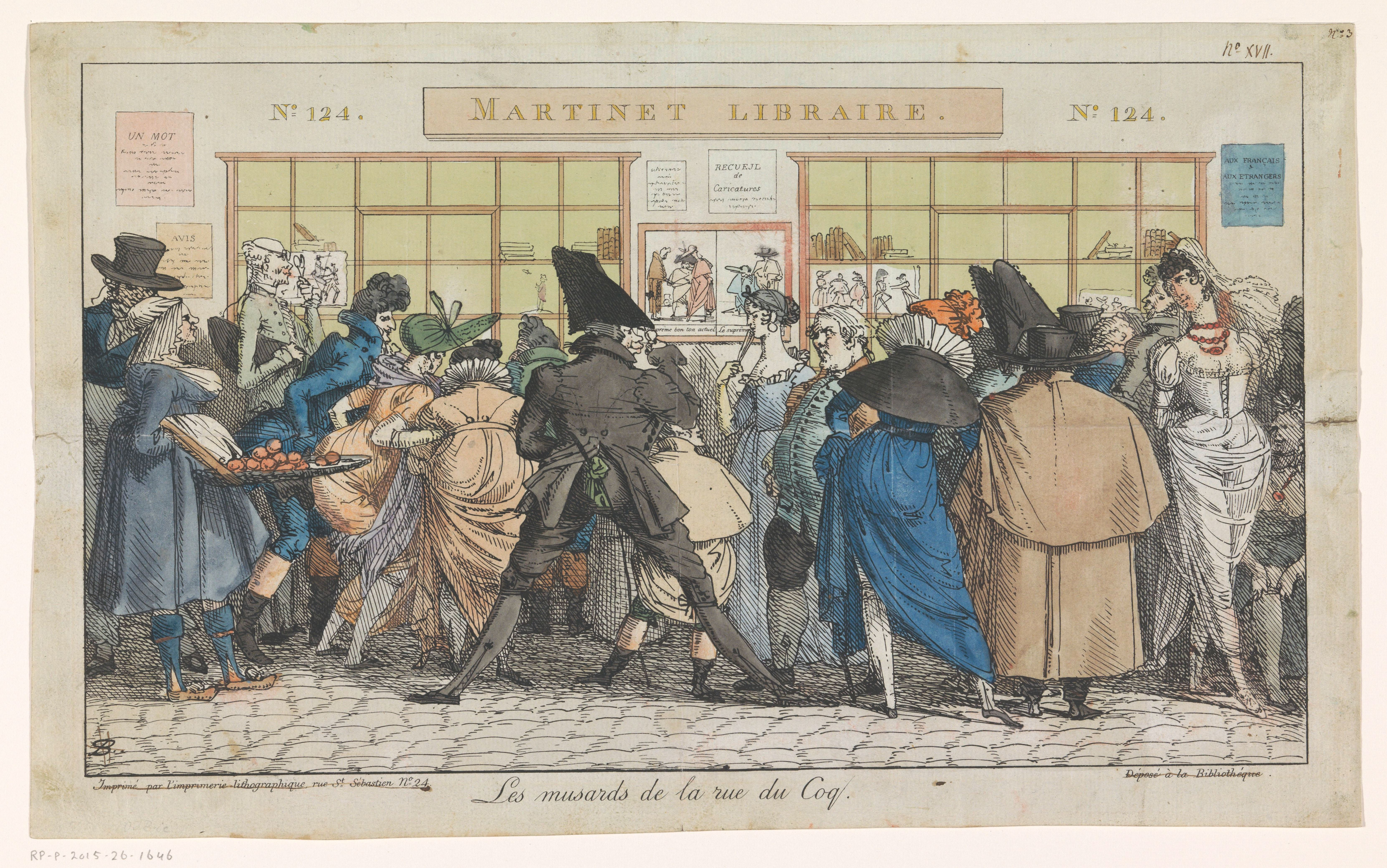 IdentificatieTitel(s): Menigte voor de etalage van uitgever Aaron Martinet in de Rue du Coq te ParijsLes musards de la rue du Coq (titel op object)Objecttype: prent Objectnummer: RP-P-2015-26-1646Opschriften / Merken: verzamelaarsmerk, verso, gestempeld: Lugt 2228verzamelaarsmerk, verso, gestempeld: Lugt 4779nummer, recto rechtsboven, geschreven in bruine pen: ‘no. XVII / No. 3’octrooivermelding, recto, gedrukt: ‘Déposé à la Bibliothéque’VervaardigingVervaardiger: prentmaker: Pierre Nolasque Bergeret (vermeld op object)drukker: Peter Friedrich Andréuitgever: Aaron MartinetPlaats vervaardiging: ParijsDatering: 1803 - 1805Fysieke kenmerken: penlithografie, met de hand gekleurdMateriaal: papier Techniek: penlithografie / met de hand kleurenAfmetingen: blad: h 250 mm × b 408 mmToelichtingHet monogram van de kunstenaar, het adres van de drukker en 'Déposé à la Bibliothèque' zijn doorgehaald in pen.OnderwerpWat: shop-window, show-windowpublishing, publisherprint, e.g.: engraving, etching, lithographpolitical caricatures and satiresWaar: ParijsVerwerving en rechtenCredit line: Legaat van de heer S. Emmering, AmsterdamVerwerving: legaat 2000Copyright: Publiek domein